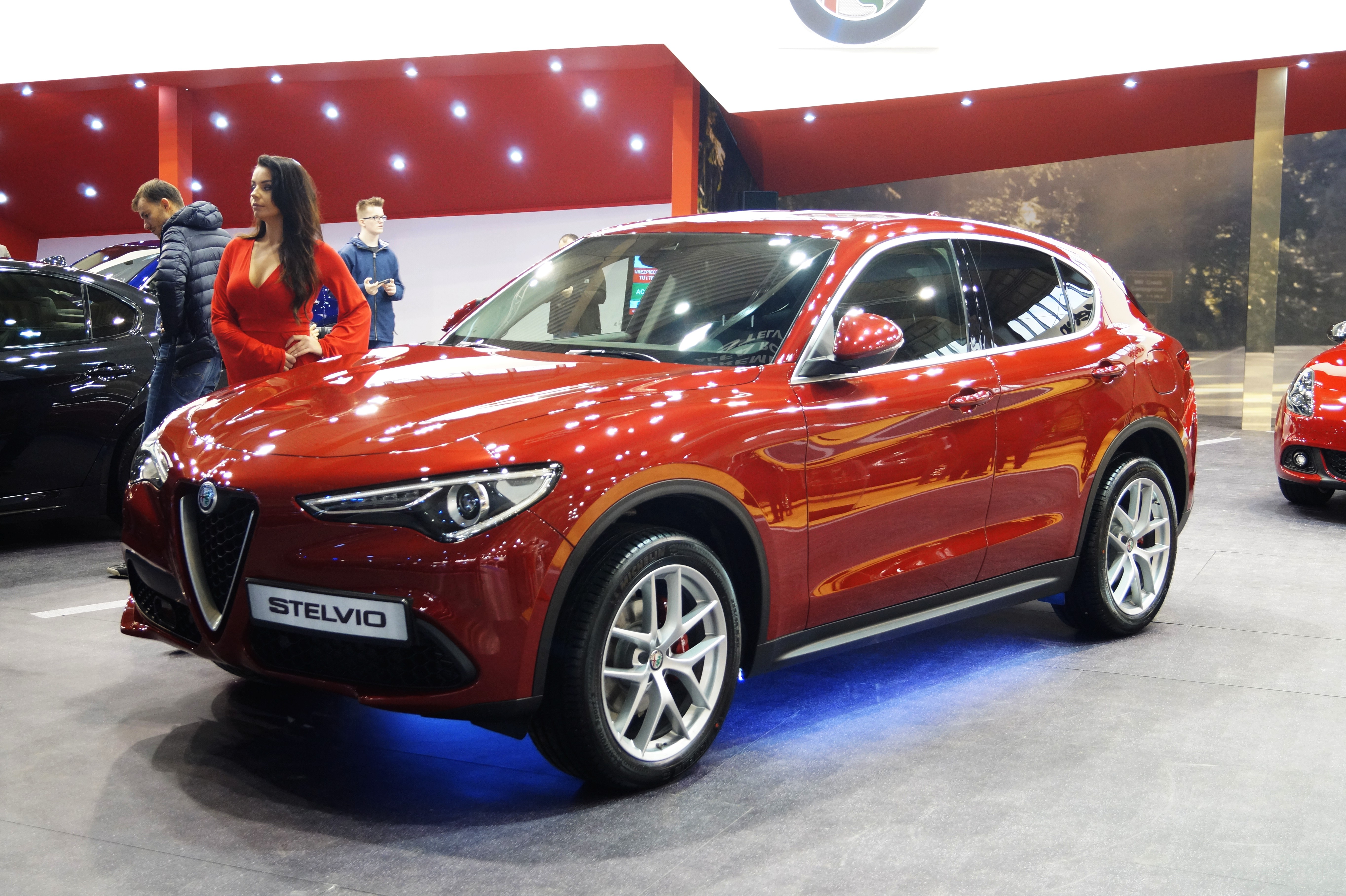 Lewy przód Alfy Romeo Stelvio na Motor Show Poznań 2017.